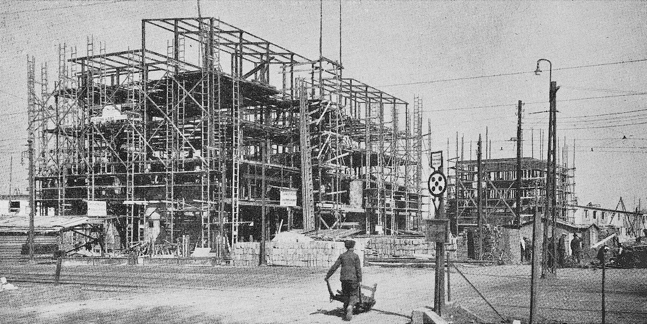 Dom nr 7 w budowie. Źródło